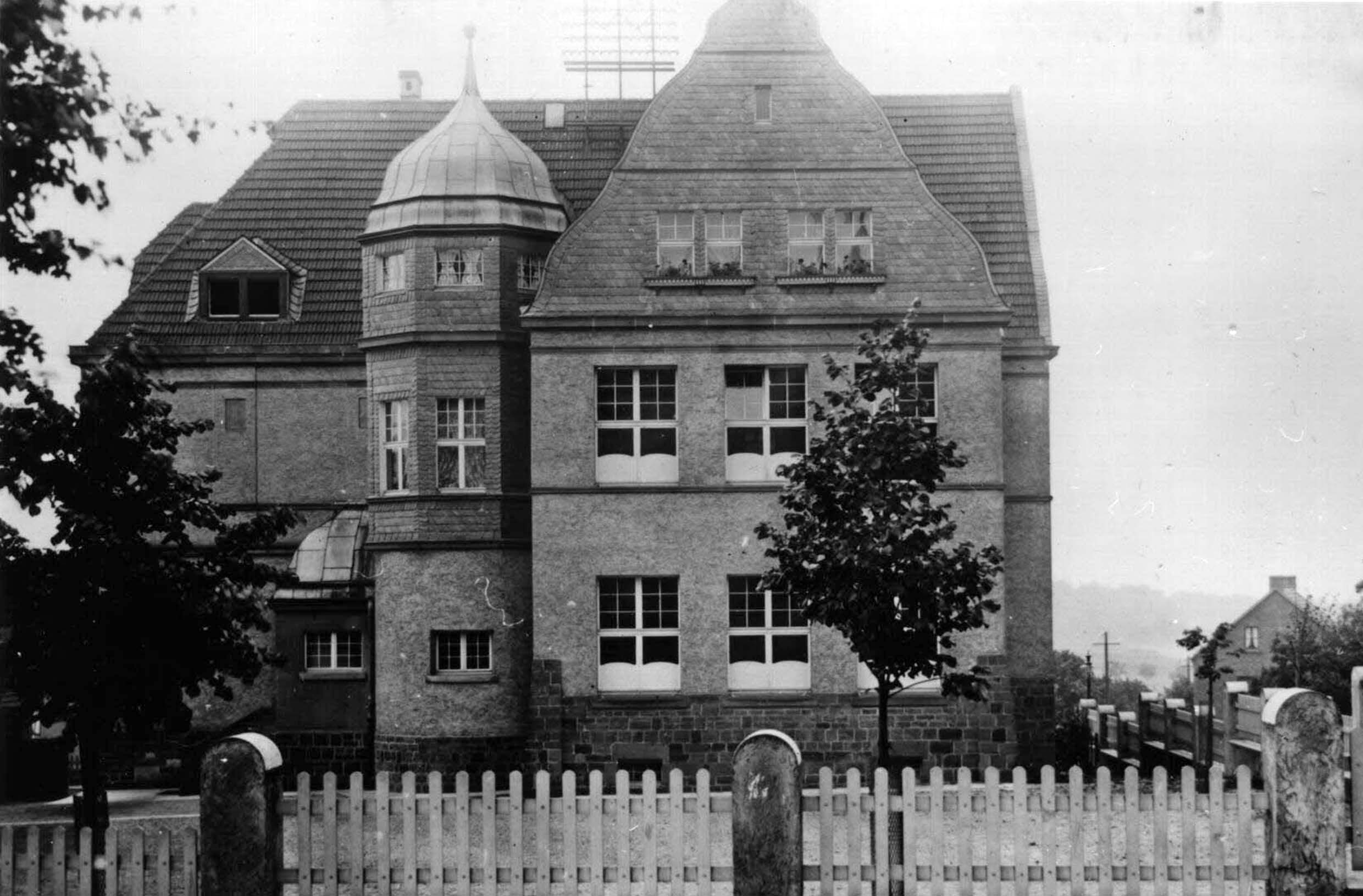 Das Progymnasium Bensberg kurz nach seiner Fertigstellung